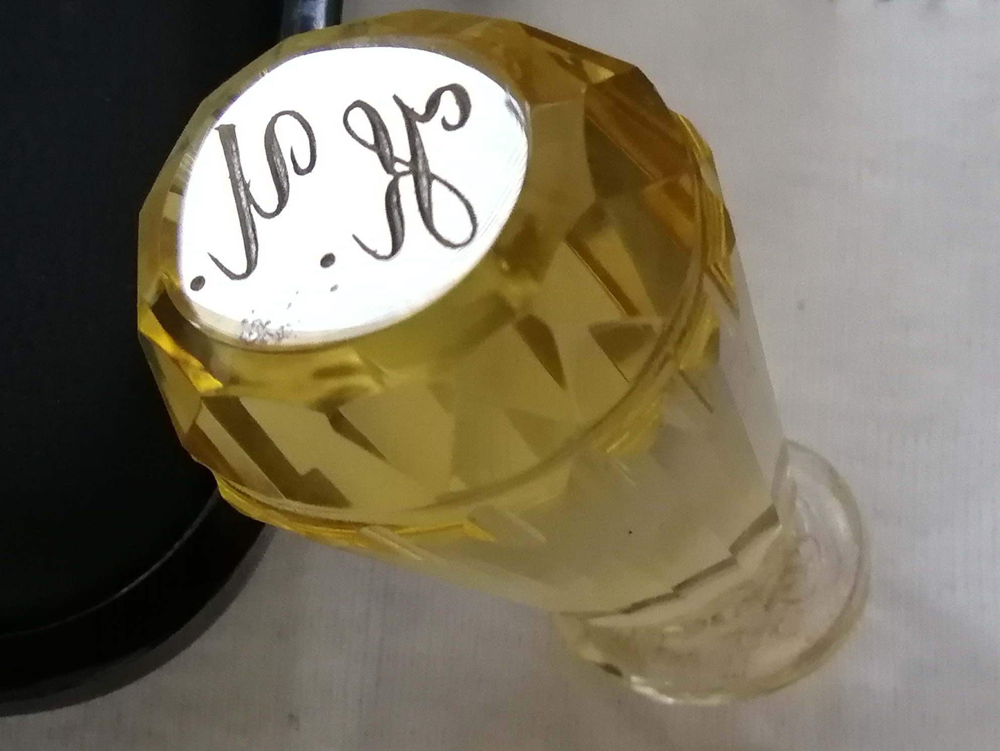 Pečetidlo biskupa Konstantyna Czechowicze (hlava pečetidla s monogramem)